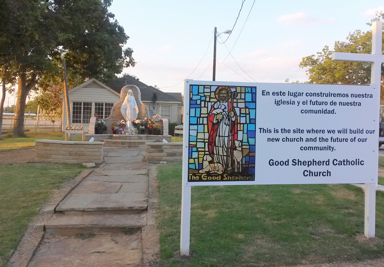 Sitio de Nueva Iglesia del Buen Pastor en Garland, Texas